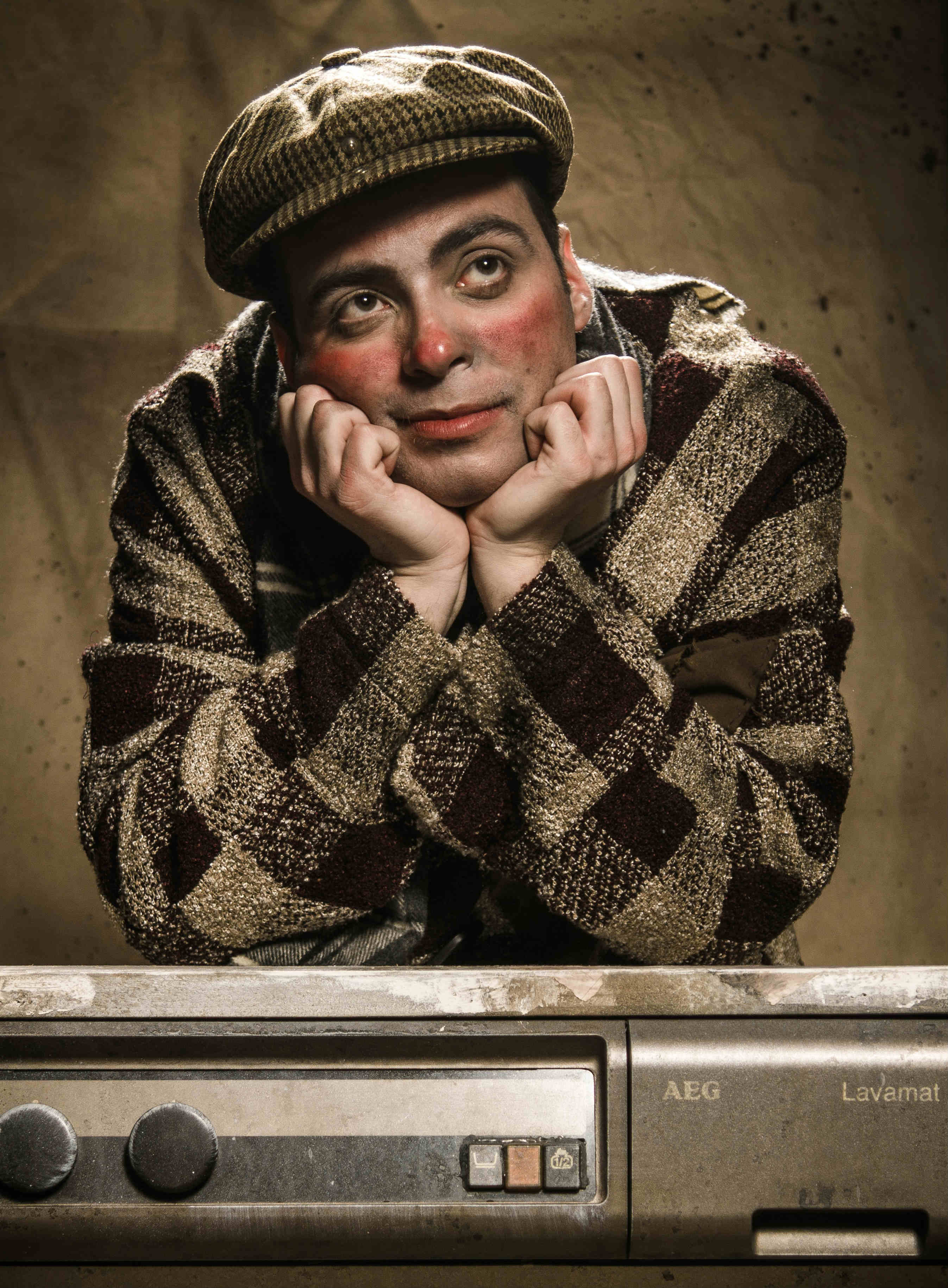 trasformista